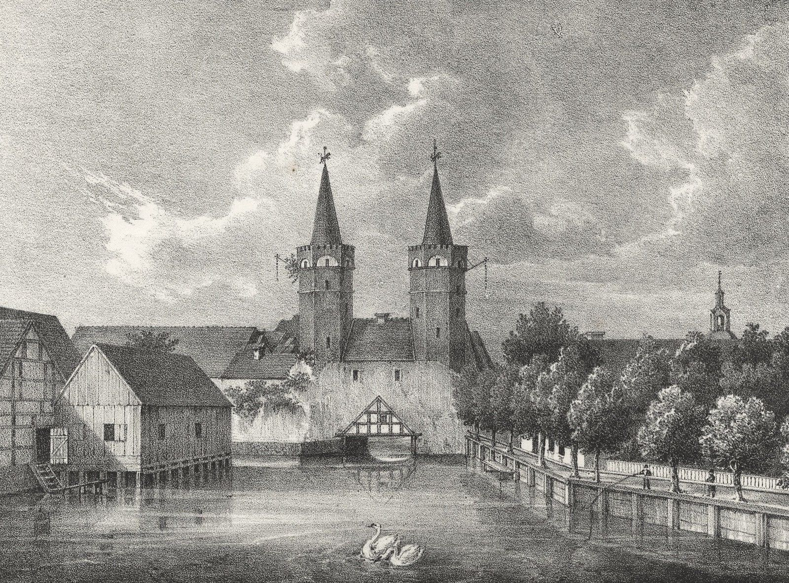 Das Mühlenthor in Stargard, Historische Ortsansicht. Lithographie, um 1845. 13,8 x 18,6 cm (Darstellung) / 20,3 x 26,3 cm (Blatt), Unterhalb der Darstellung mittig betitelt, sowie mit dem Vermerk "Lith. Anst. v. E. Sanne u. Co. in Stettin" unten rechts versehen.